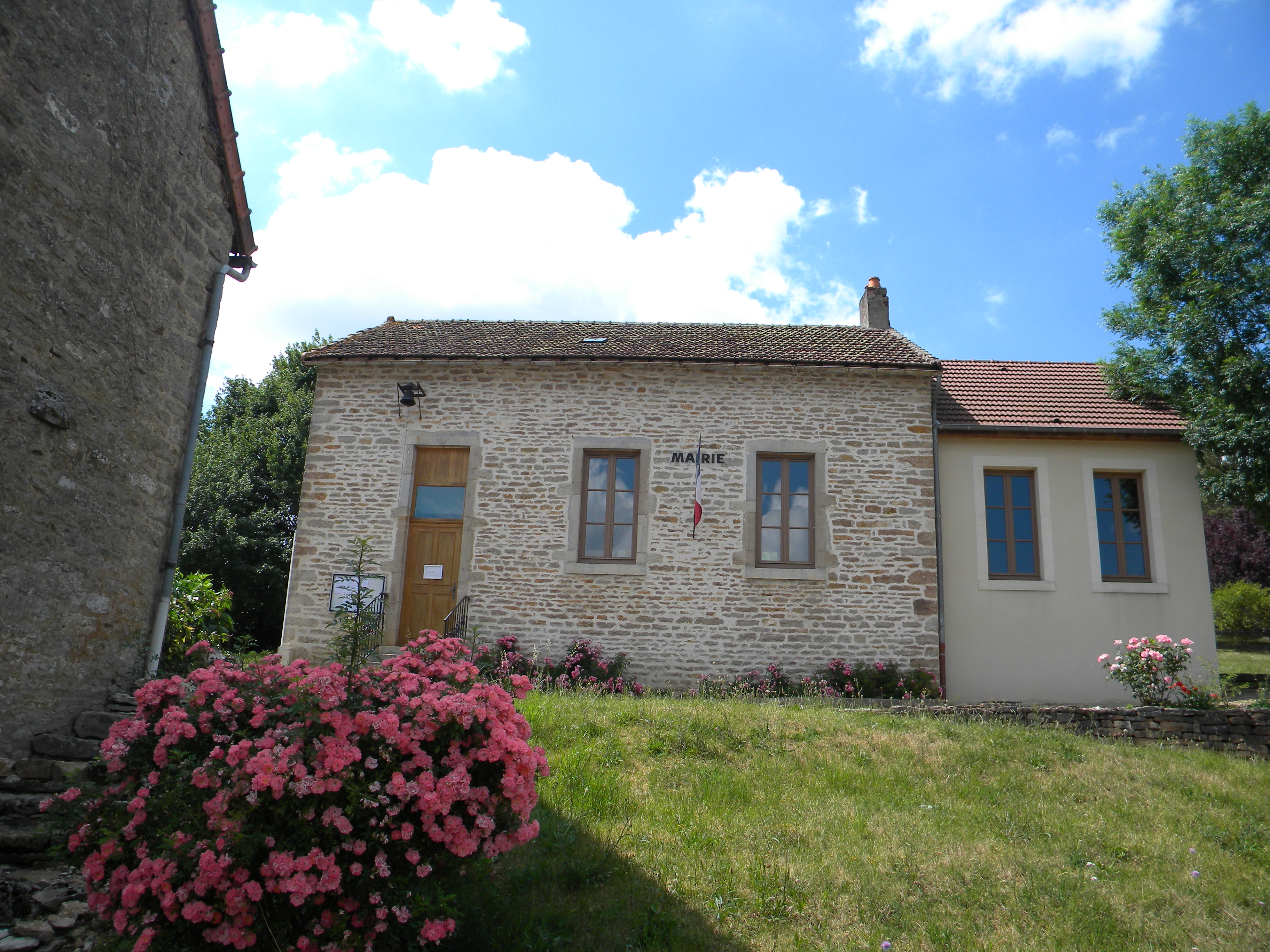 Urbodomo